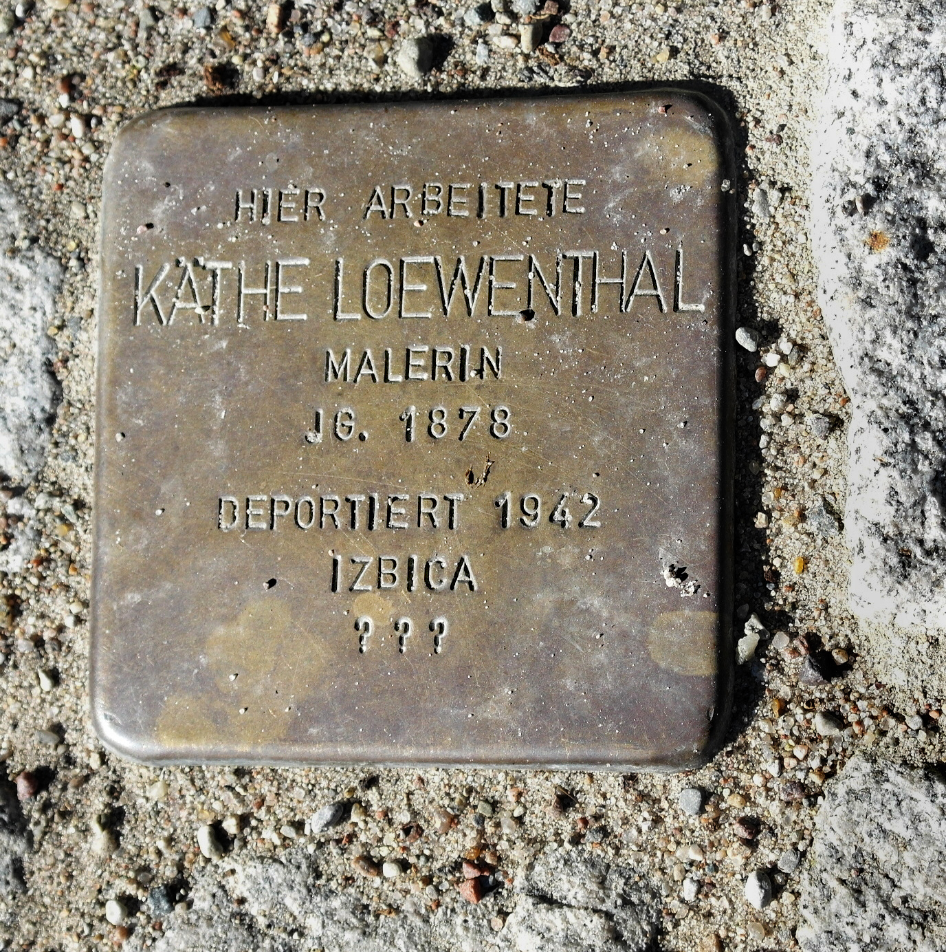 Stolperstein für Käthe Löwenthal in Vitte, Gemeinde Insel Hiddensee